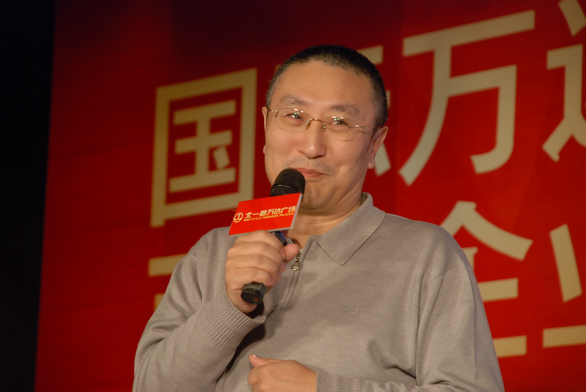 中文（中国大陆）: 2010年12月参加万达商业广场项目,解读当前经济。